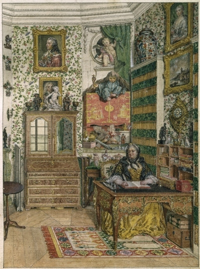 Grevinnan Ulla Tessin i sin skrivkammare, akvarell på papper ca 1762-1763, av Olof Fridsberg (1728-1795). Fru Ulla Tessin, gift med Carl Gustaf Tessin (1695-1770), hon var född Ulrika "Ulla" Lovisa Sparre (1711-1768). Nationalmuseum, Stockholm.